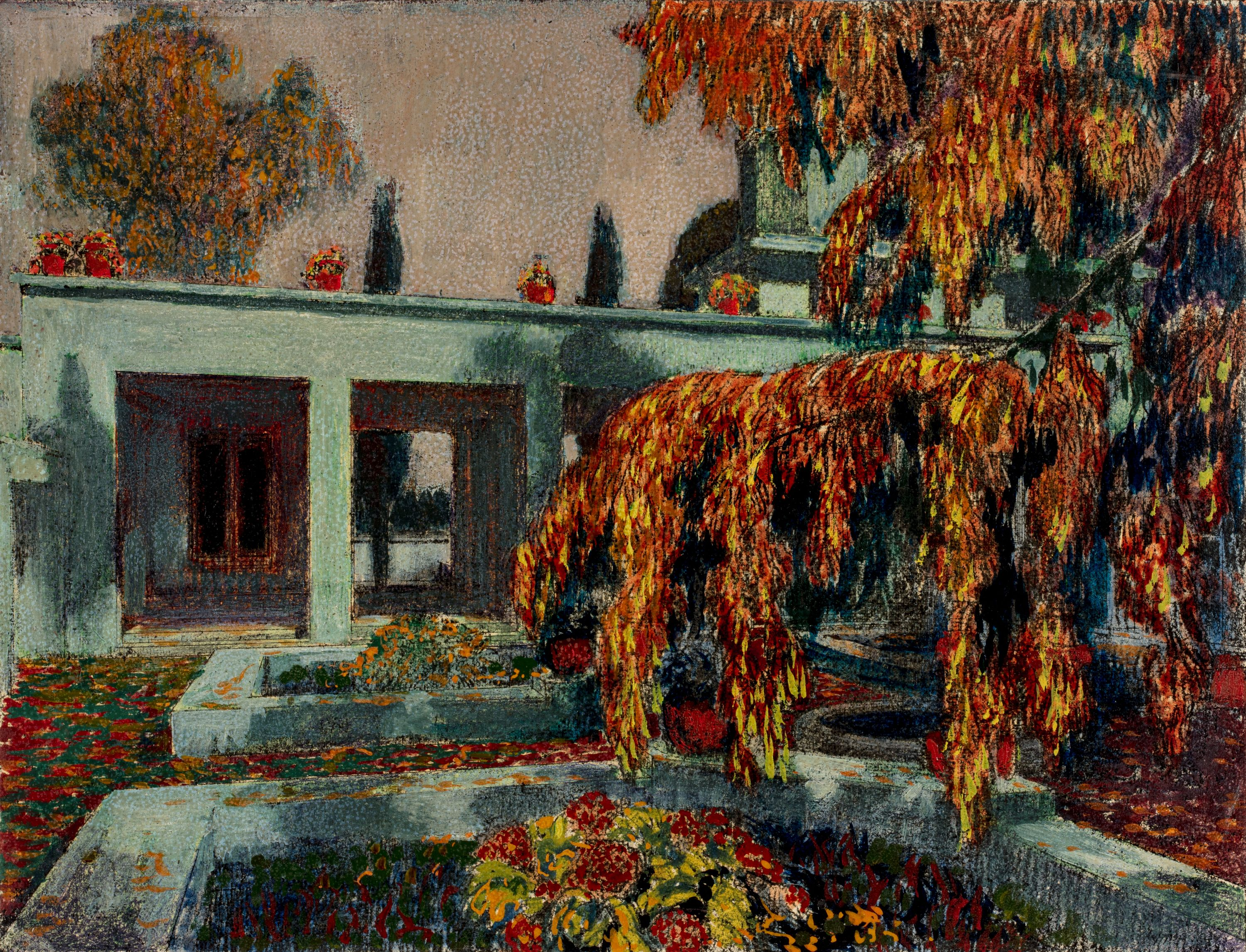 Projet de patio villa Mme Garnier, Saint-Rambert, 5 rue de la Mignonne.